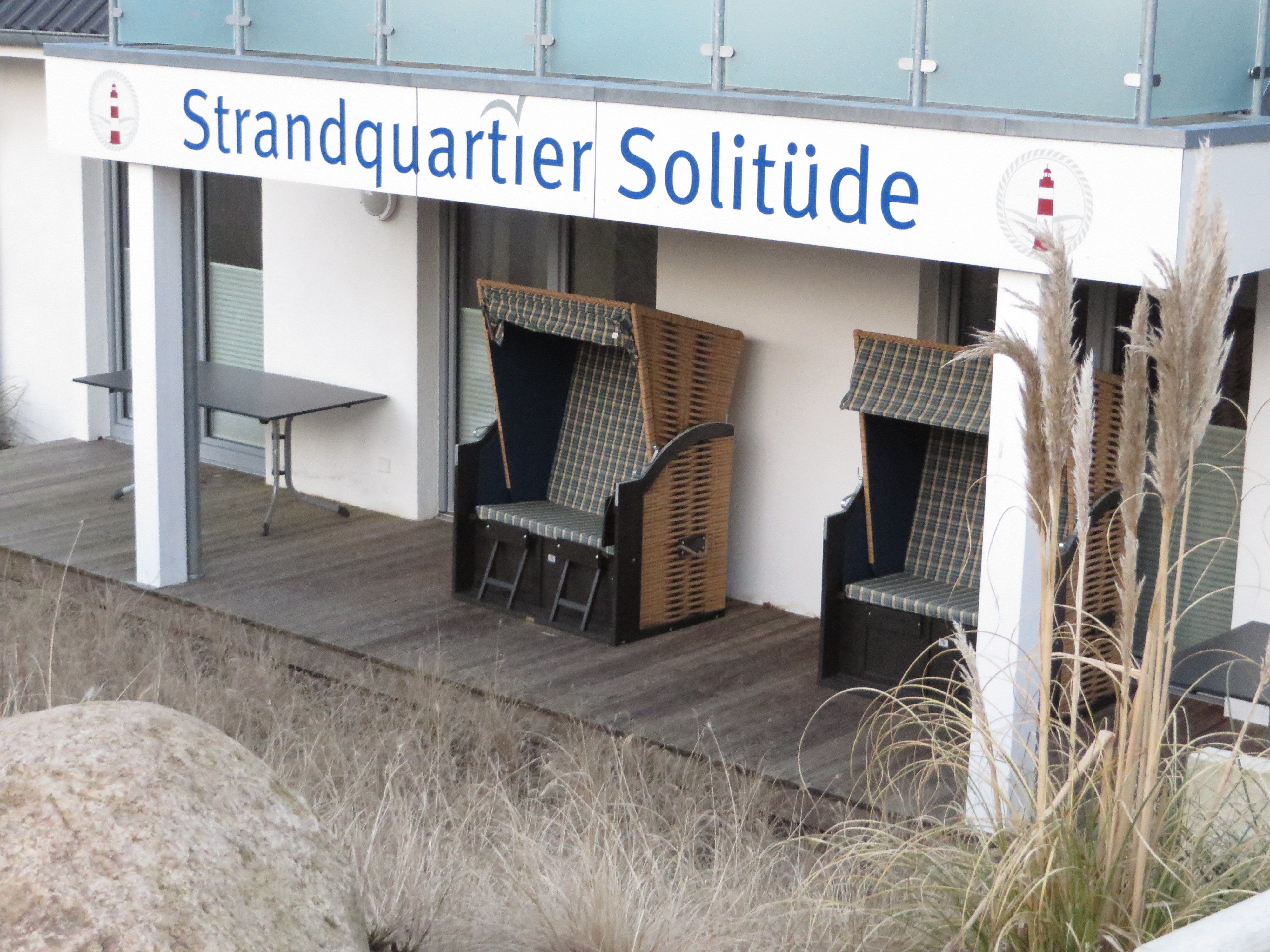 Strandquartier Solitüde (Flensburg-Mürwik 13 März 2016), Bild 11